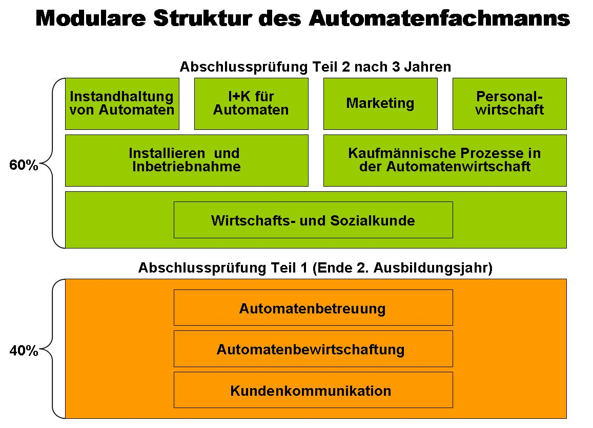 Modulare Ausbildungsstruktur des Automatenfachmanns mittels Wahlqualifikationen